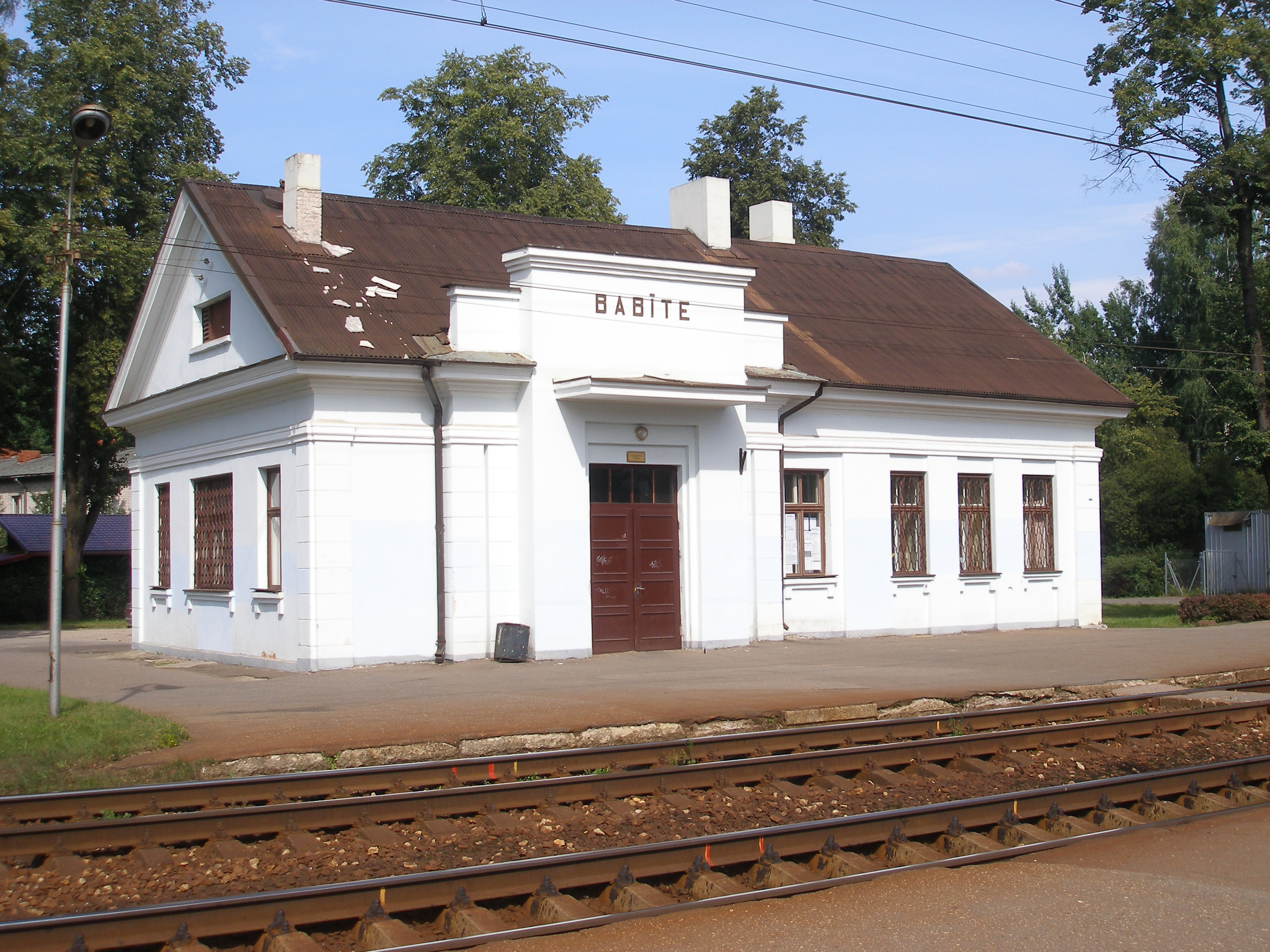 Babītes stacijas ēka.